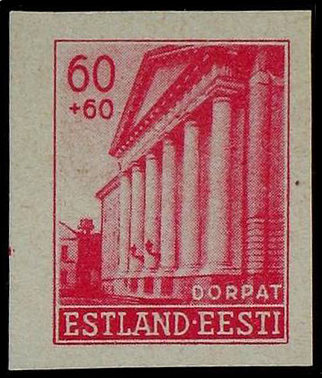 Почтовая марка Тарту (Эстония). Тартуский университет